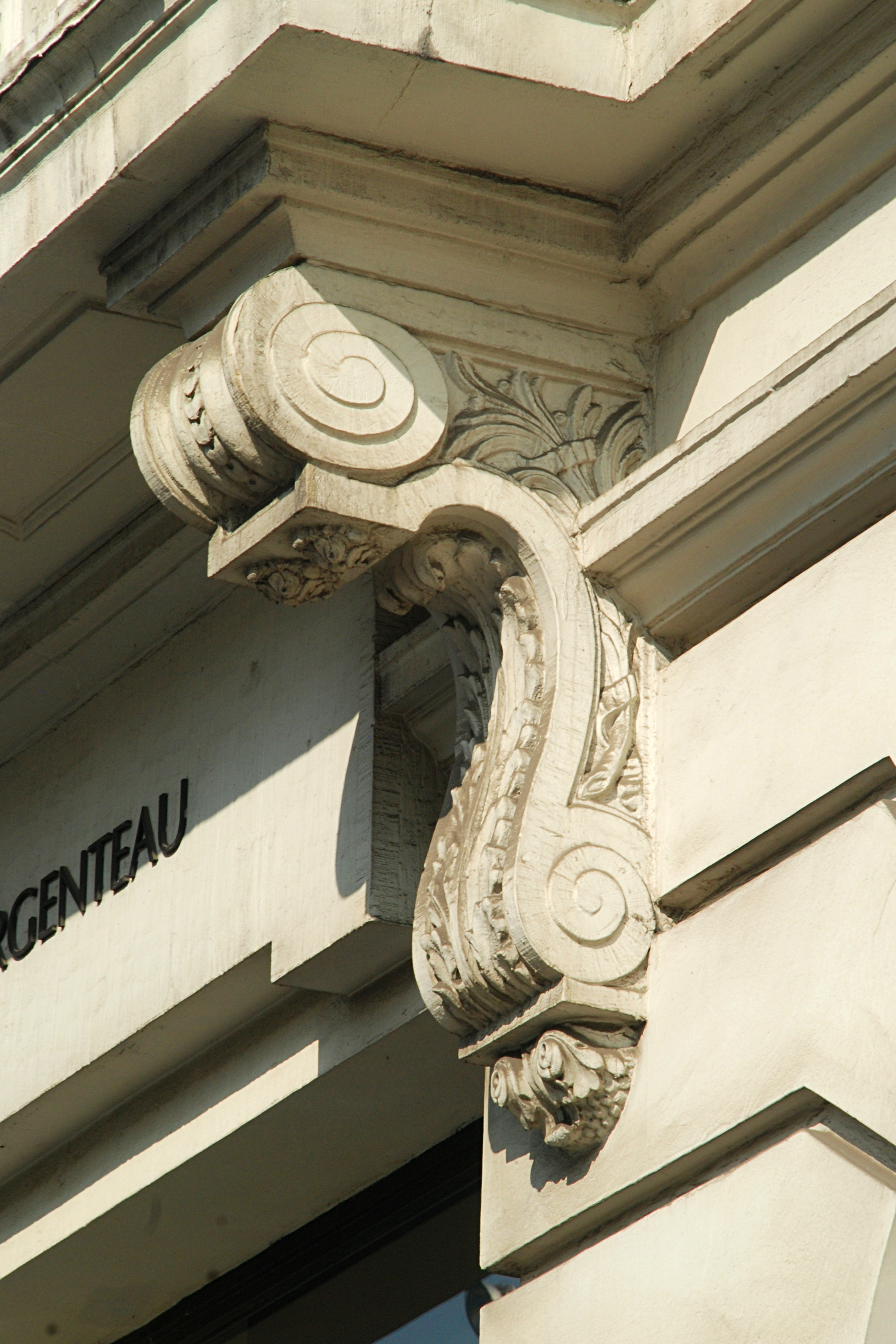 Belgique - Bruxelles - Hôtel des Brasseurs